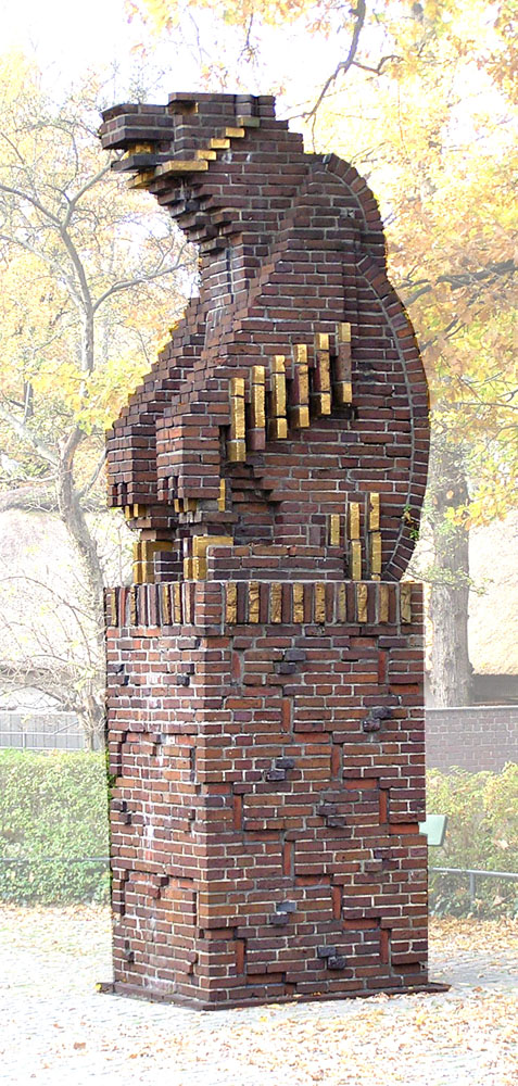 Die Skulptur eines Bären im Zoo Berlins